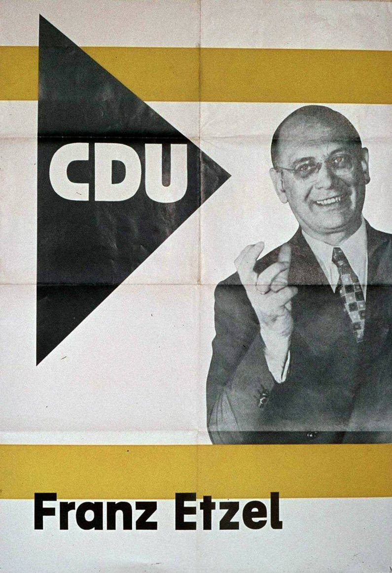 CDUAbbildung:PorträtfotoKommentar:Kandidat aus SolingenPlakatart:Kandidaten-/Personenplakat mit PorträtObjekt-Signatur:10-001: 656Bestand:Plakate zu Bundestagswahlen (10-001)GliederungBestand10-18:Plakate zu Bundestagswahlen (10-001) » Die 3. Bundestagswahl am 15. September 1957 » CDU » Mit PorträtfotoLizenz:KAS/ACDP 10-001: 656 CC-BY-SA 3.0 DE